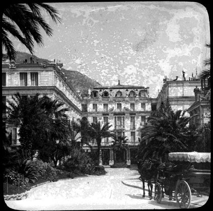 Fonds Trutat - Photographie ancienne Cote : TRU C 1959 Localisation : Fonds ancien (S 30) Original non communicable Titre : Hôtel, Monte-Carlo Auteur : Trutat, Eugène Rôle de l’auteur : Photographe Lieu de création : Monte-Carlo (Monaco) Date de création : 1859-1910 [entre] Mesures : : 9 x 10 cm Observations : Note manuscrite de Trutat : " Monte-Carlo : hôtel ". Mot(s)-clé(s) : -- Hôtel -- Rue -- Bâtiment -- Architecture -- Voiture à attelage -- Cheval -- Jardin -- Palmier -- Monte-Carlo (Monaco) -- Monaco (Principauté de) -- 19e siècle, 2e moitié -- 20e siècle, 1e quart Médium : Photographies -- Positifs sur plaque de verre -- Noir et blanc -- Scènes de rue -- Détourage au papier collé -- Tâche Bibliothèque de Toulouse. Domaine public